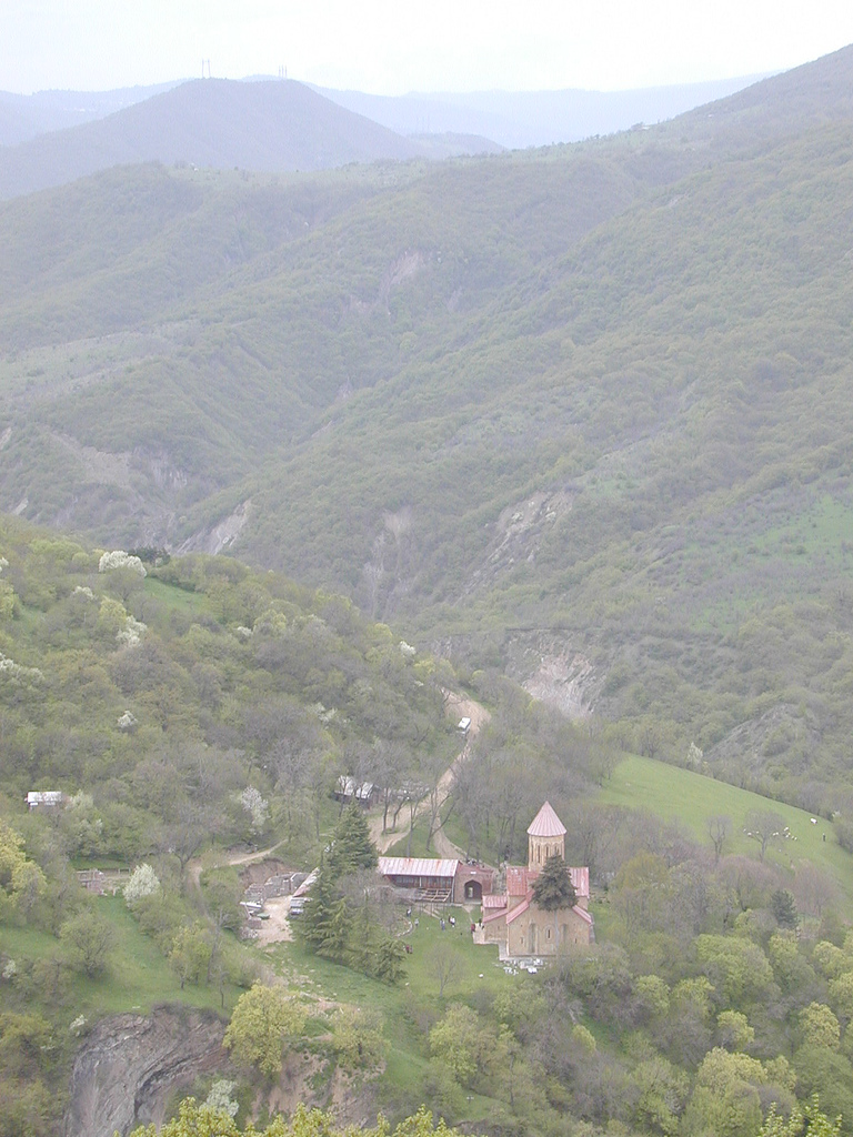 ბეთანია, ქართული ხუროთმოძღვრების ძეგლი, ჯვაროვან-გუმბათოვანი ტაძარი. აგებულია XII-XIII საუკუნეების მიჯნაზე. მდებარეობს თბილისის სამხრეთ-დასავლეთით (16 კმ), ვერის ტყიან ხეობაში (მდინარე ვერის მარჯვენა მხარეს). რესტავრირებულია XIX საუკუნის ბოლოს. გეგმით სწორკუთხედია. გუმბათი ოდნავაა გადანაცვლებული აღმოსავლეთისაკენ და მნიშვნელოვნადაა ზემოთ აზიდული. სამხრეთი შესასვლელის წინ ვარსკვლავისებრი კამარით გადახურული კარიბჭეა. ტაძარი გარედან მოპირკეთებულია თლილი ქვით, ხოლო კედლებისა და გუმბათის ყელის აგურის წყობა გვიანდელი რესტავრაციის დროინდელია. აღმოსავლეთ ფასადზე შემორჩენილი ტრადიციული ნიშები მოჩუქურთმებული თავსართით უკავშირდება შუა სარკმელს. მოჩუქურთმებულია სარკმლის საპირეებიც. ტაძარში დაცულია კედლის მხატვრობა, ქართული მონუმენტური მხატვრობის განვითარების გარკვეული ეტაპის - XII-XIII საუკუნეების მიჯნის შესანიშნავი ნიმუში. გამოირჩევა შესწულების მაღალი ოსტატობით. საკურთხევლის კონქში მოთავსებული იყო "ვედრების" კომპოზიცია (შემორჩენილია მხოლოდ ტახტზე მჯდომი ქრისტეს ფიგურის ფრაგმენტები). საკურთხევლის აფსიდის კედლებზე გამოსახული არიან წინაწარმეტყველები, რომელთაც ხელში ქართულწარწერებიანი გრაგნილები უჭირავთ. გუმბათის მოხატულობა ერთიანად შელესილია. ჩრდილოეთი კედელი ეთმობა "მაცხოვრის" ვნებათა ციკლს, ხოლო სამხრეთი კედელი - ძველი აღქმია სცენებს. ფრაგმენტების მიხედვით დასავლეთი კედელი ეკავა "განკითხვის დღის" კომპოზიციას. რელიგიური შინაარსის სცენების გვერდით მნიშვნელოვანი ადგილი უჭირავს ისტორიულ პირთა - გიორგი III-ის, თამარ მეფისა და გიორგი ლაშას პორტრეტებს. მოხატულობა შესრულებულია თამარის სიცოცხლეში, გიორგი ლაშას თანამოსაყდრედ გამოცხადების ხანაში, 1207-ის ახლოს. ტაძრის დასავლეთით დგას დარბაზული ეკლესია (1196).